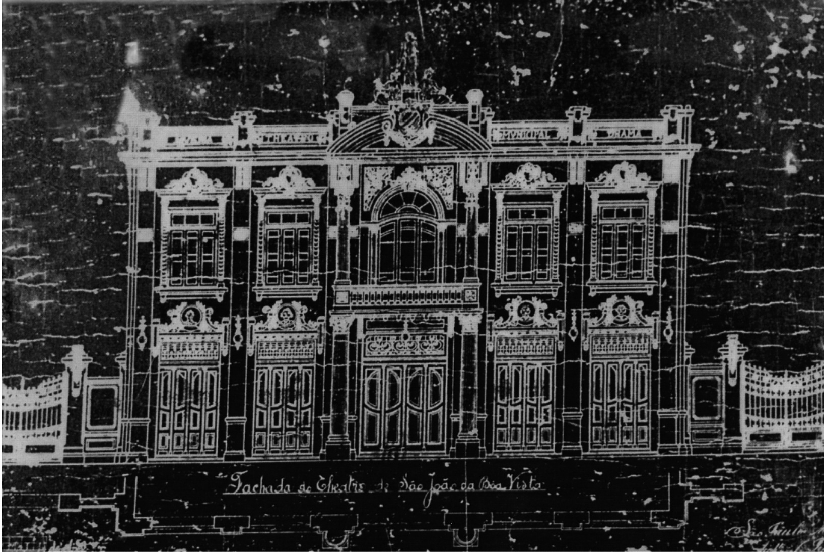 Fachada do Teatro Municipal de São João da Boa Vista (projeto)